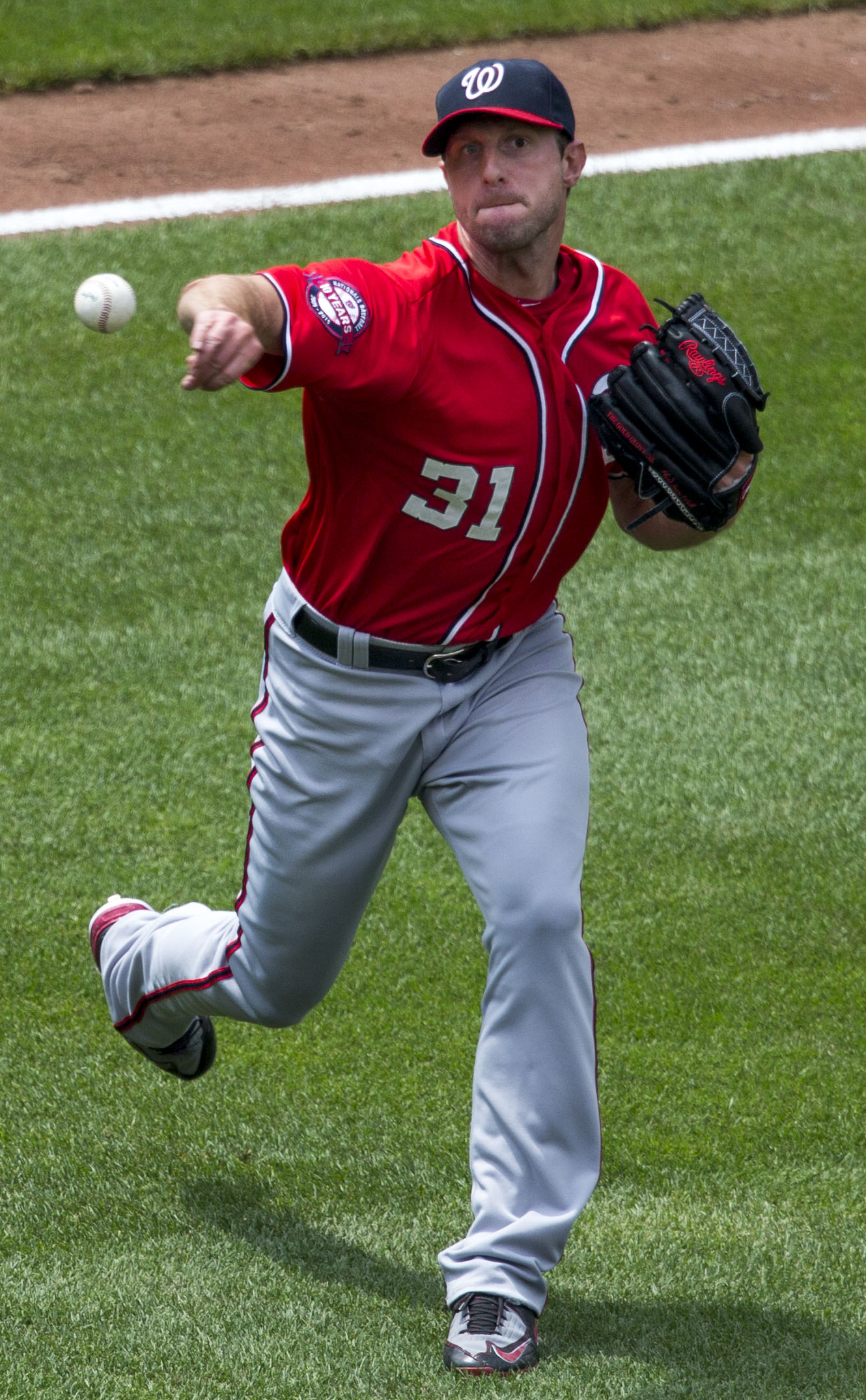 Max Scherzer